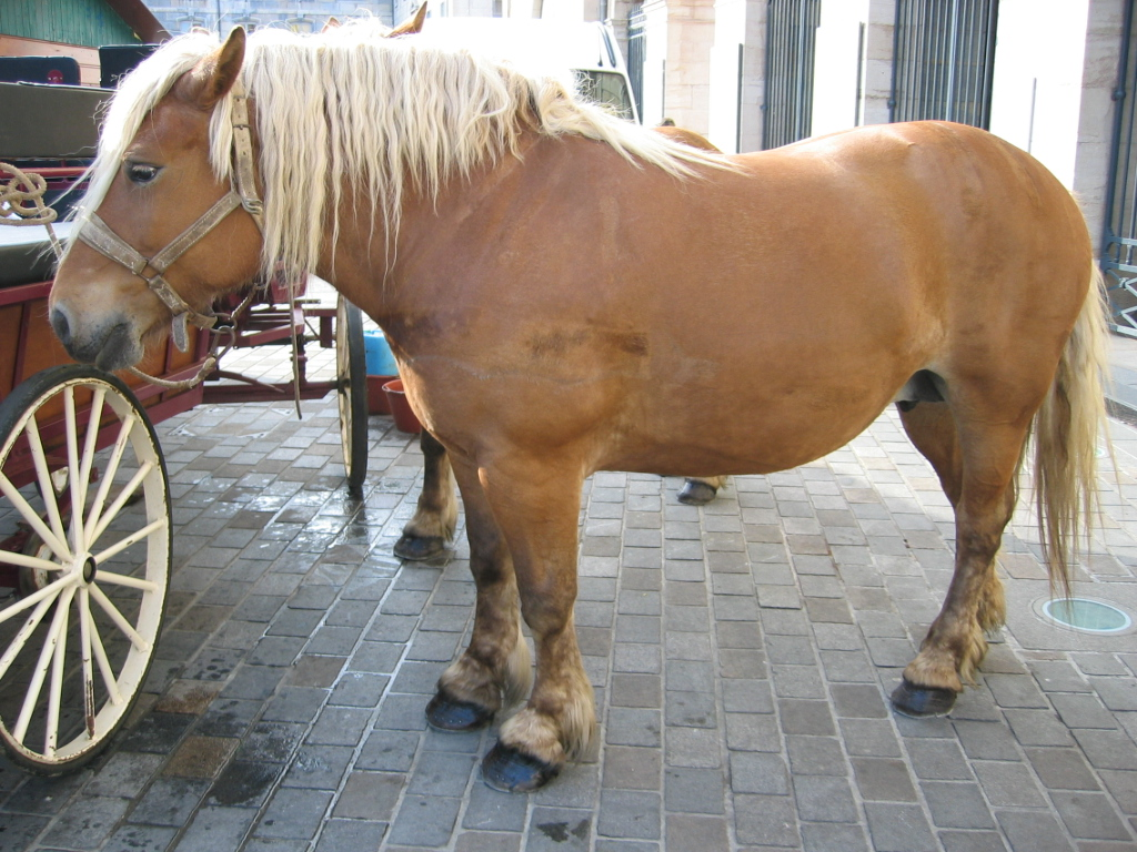 Cheval de race " comtois " - Franche-Comté - France